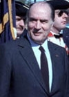 Rencontre Mitterrand et Reagan en 1981